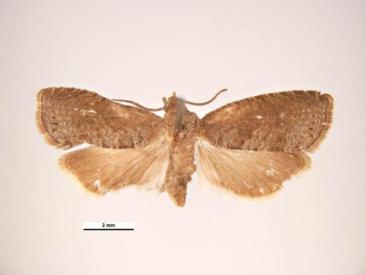 Grapholita molesta dorsal view